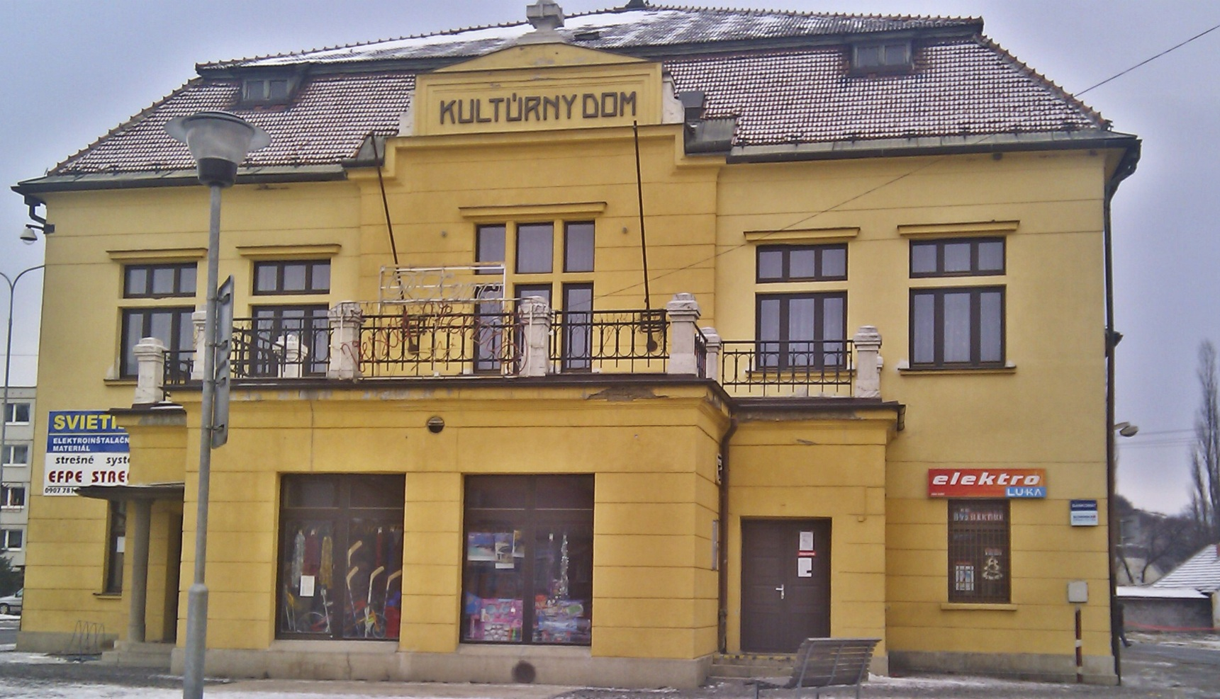 Kulturhaus im Zentrum von Spišské Vlachy